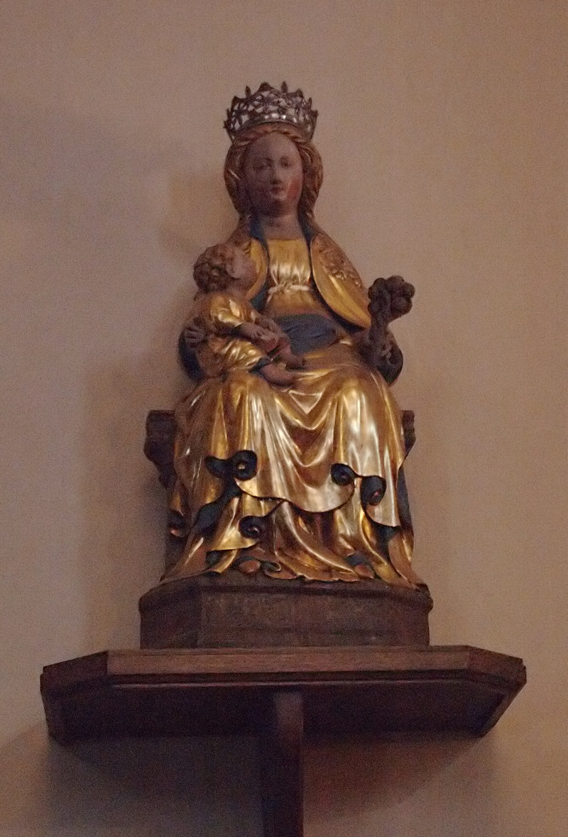 Margaretenkirche Methler, Nordrhein-Westfalen. Die Muttergottesstatue, die etwa um 1500 entstanden ist, gehört zu den sogenannten "Schönen Madonnen", die sich durch besondere Anmut auszeichnen.